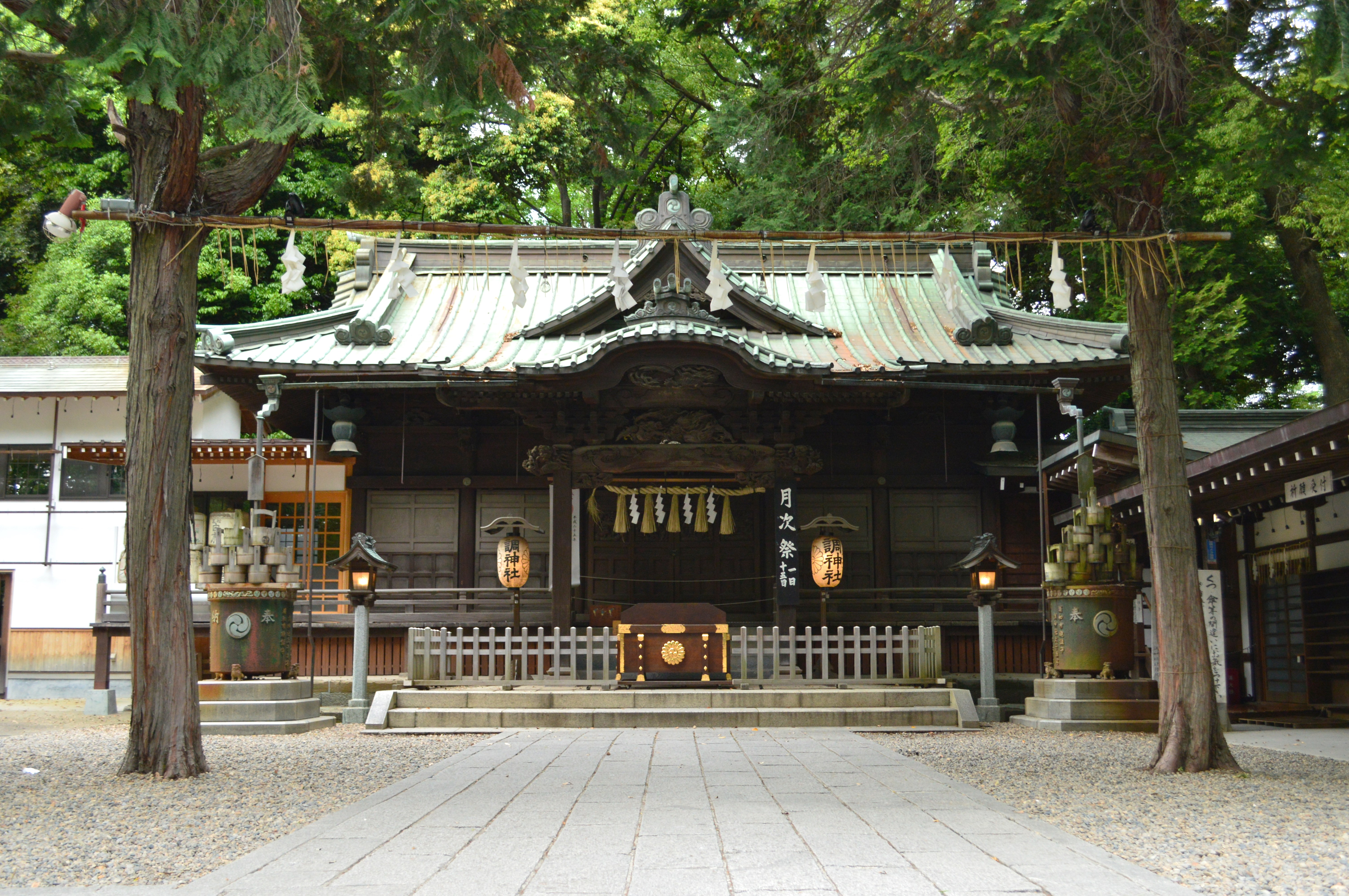 調神社 拝殿